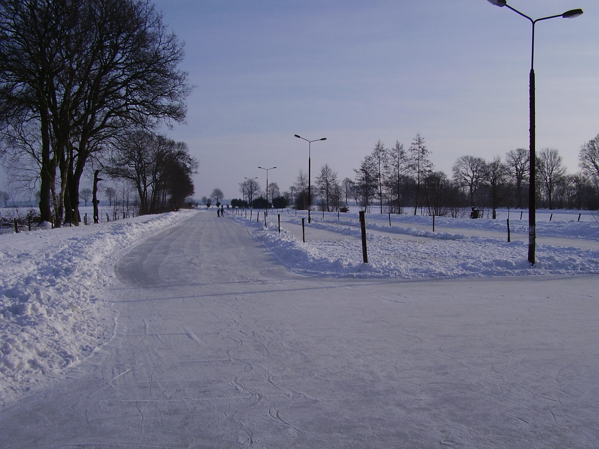 IJsbaan van Een in Drenthe